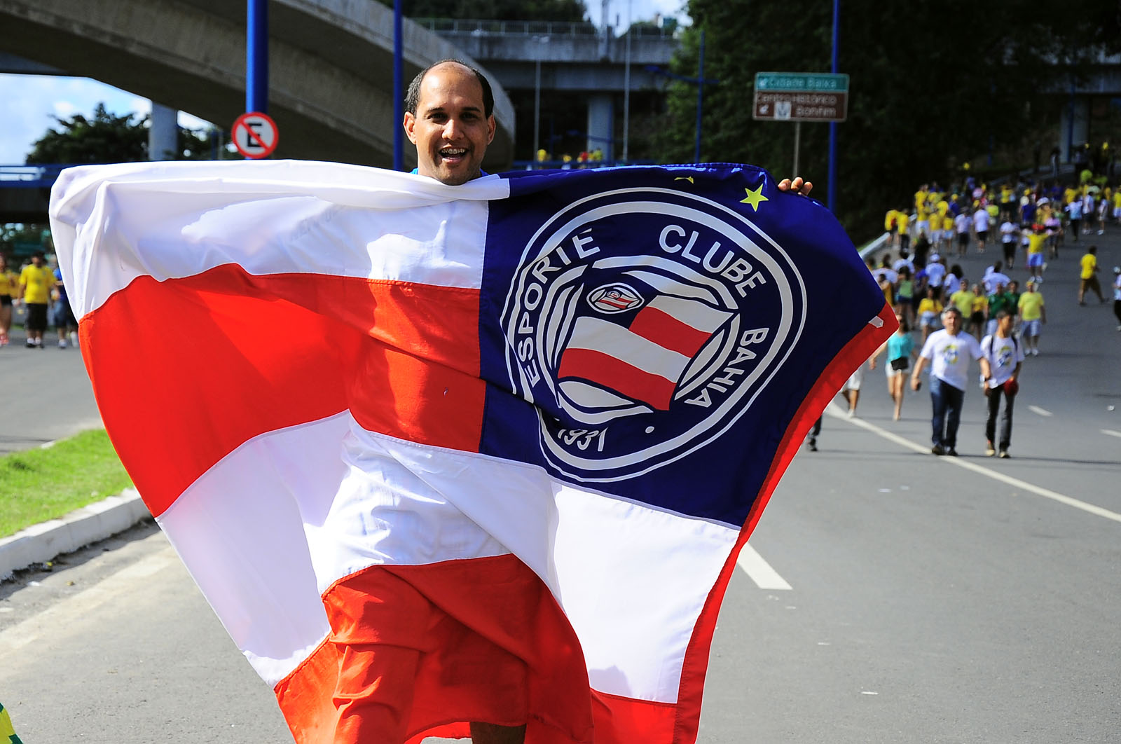 Manifestações de junho de 2013 em Salvador, Bahia, Brasil.